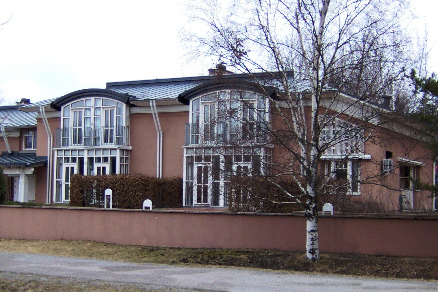 Ronald McDonalds hus vid Karolinska Universitetssjukhuset i Flemingsberg, Huddinge, sydvästra Storstockholm, våren 2006.